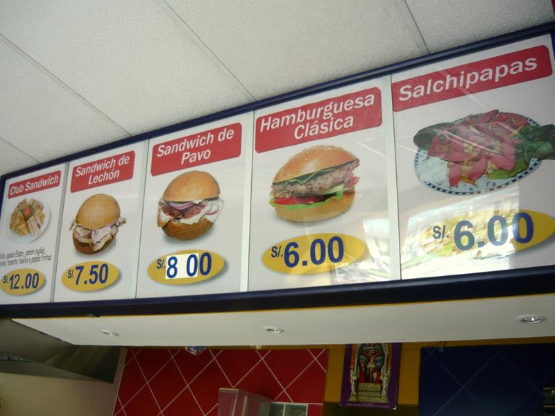 Sandwiches en BoomPlaza, un local frente a la Plaza de Armas